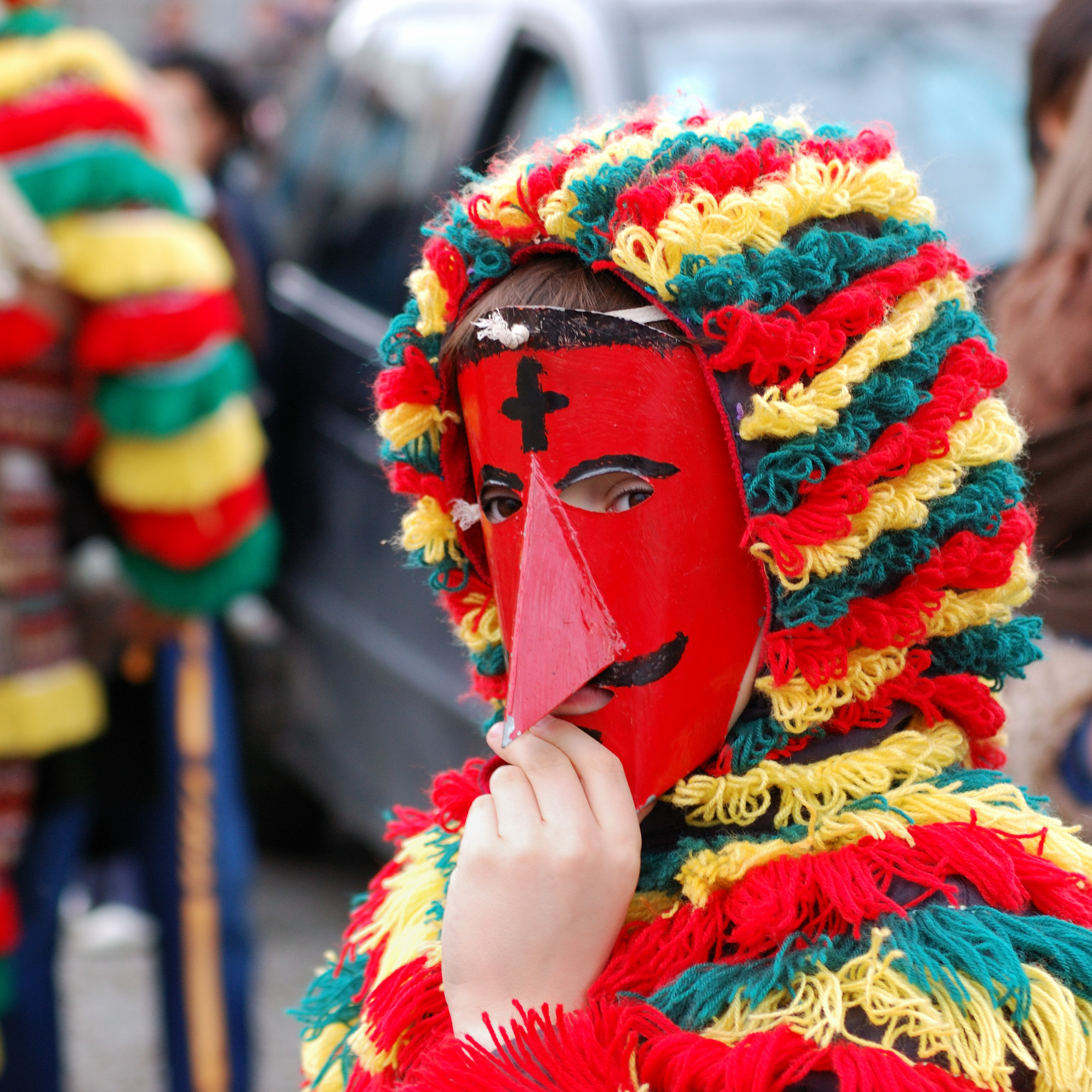 Carnaval de Podence, Portugal [2008]